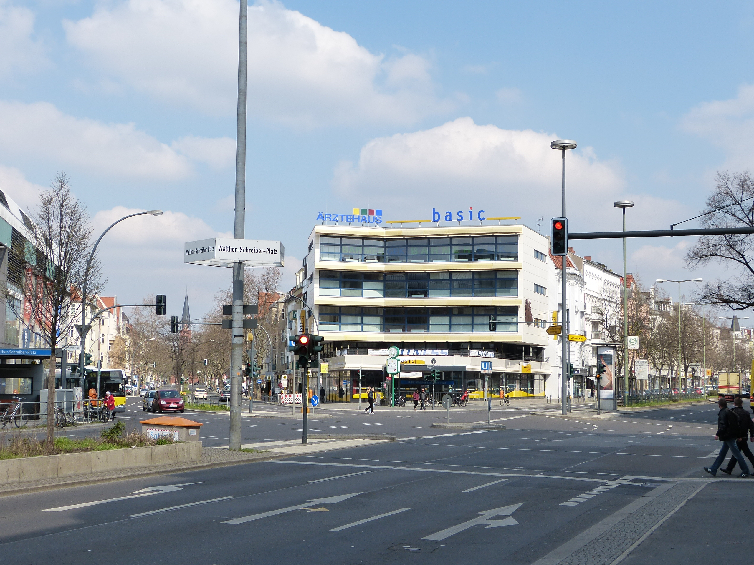 Berlin-Friedenau, Walther-Schreiber-Platz; Blick von Süden/ von der Schloßstraße